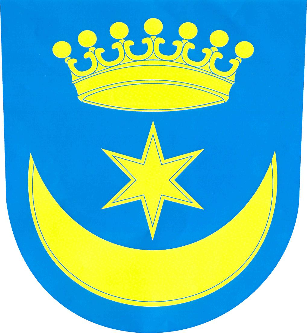 Znak obce Volanice